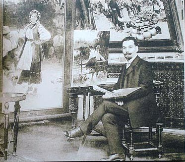 фото М. Пимоненка у майстерні. Поруч картина "Гопак"